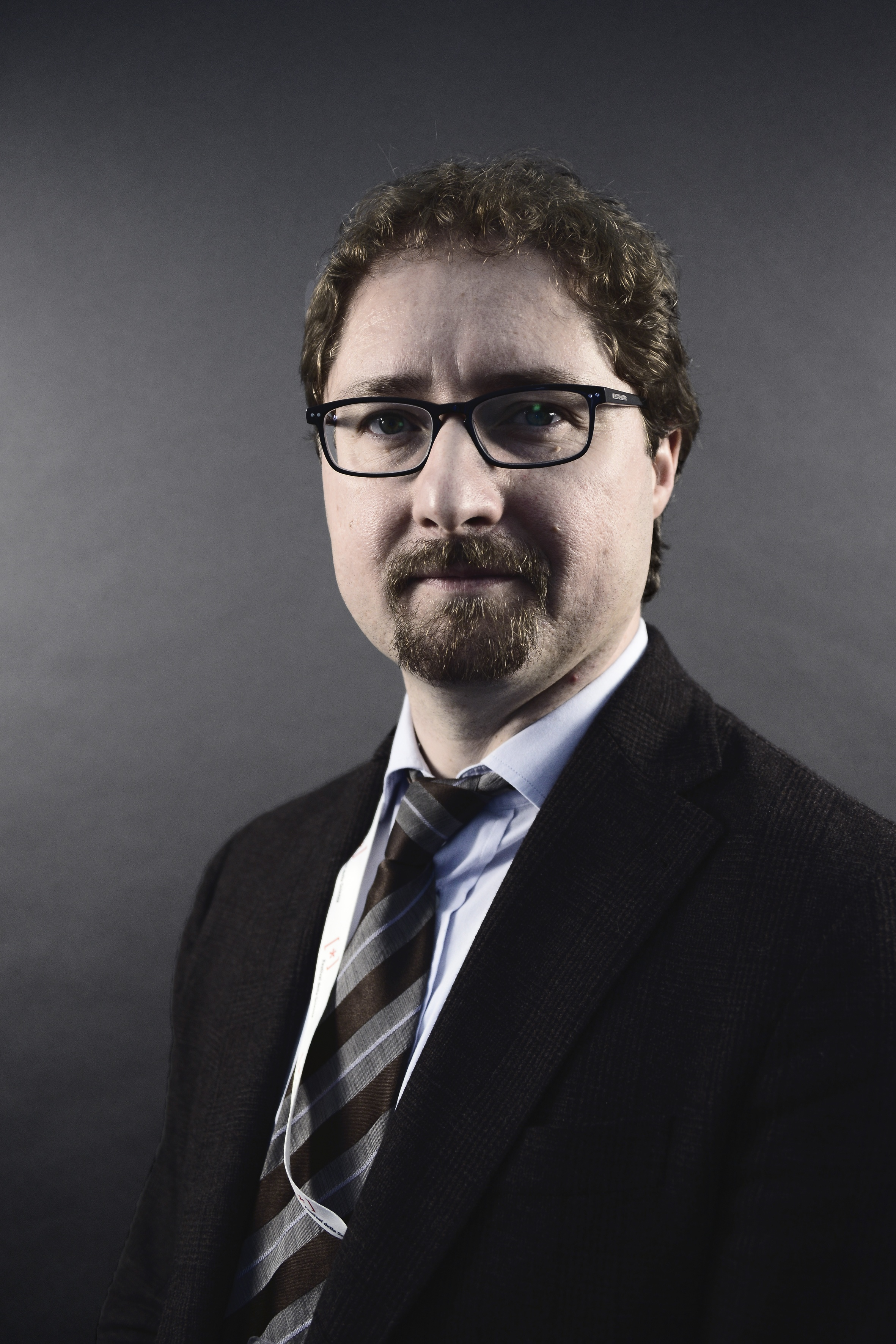 foto: Cirone-Musi